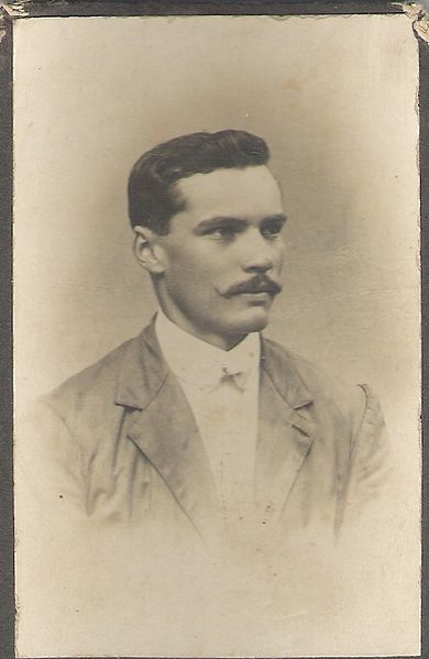 João Batista Uliano, fotografia cedida por Estela Maria Kindermann Bianchini. Acervo da família